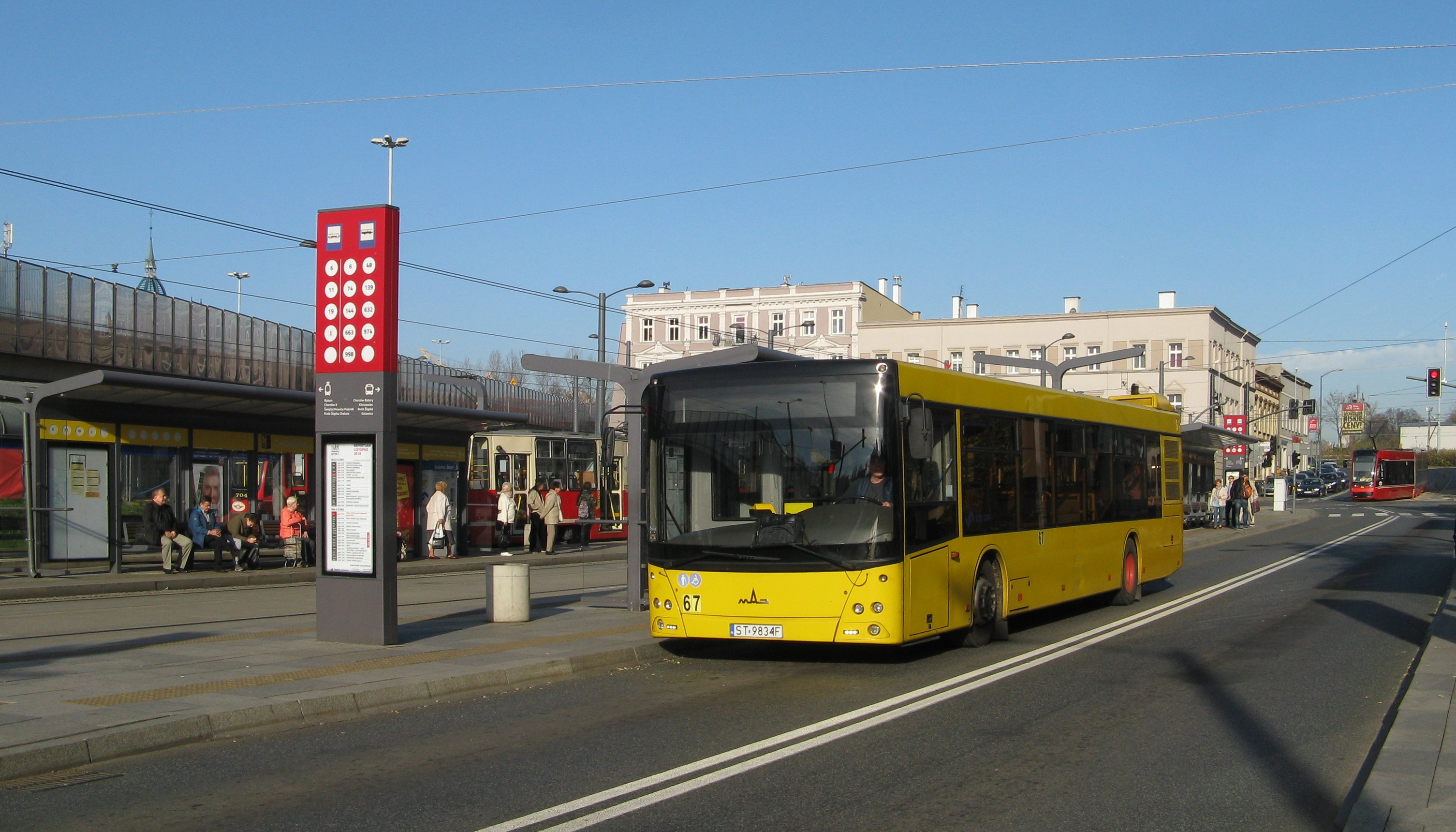 Rynek w Chorzowie, centrum przesiadkowe, autobus i tramwaj miejski, z lewej estakada